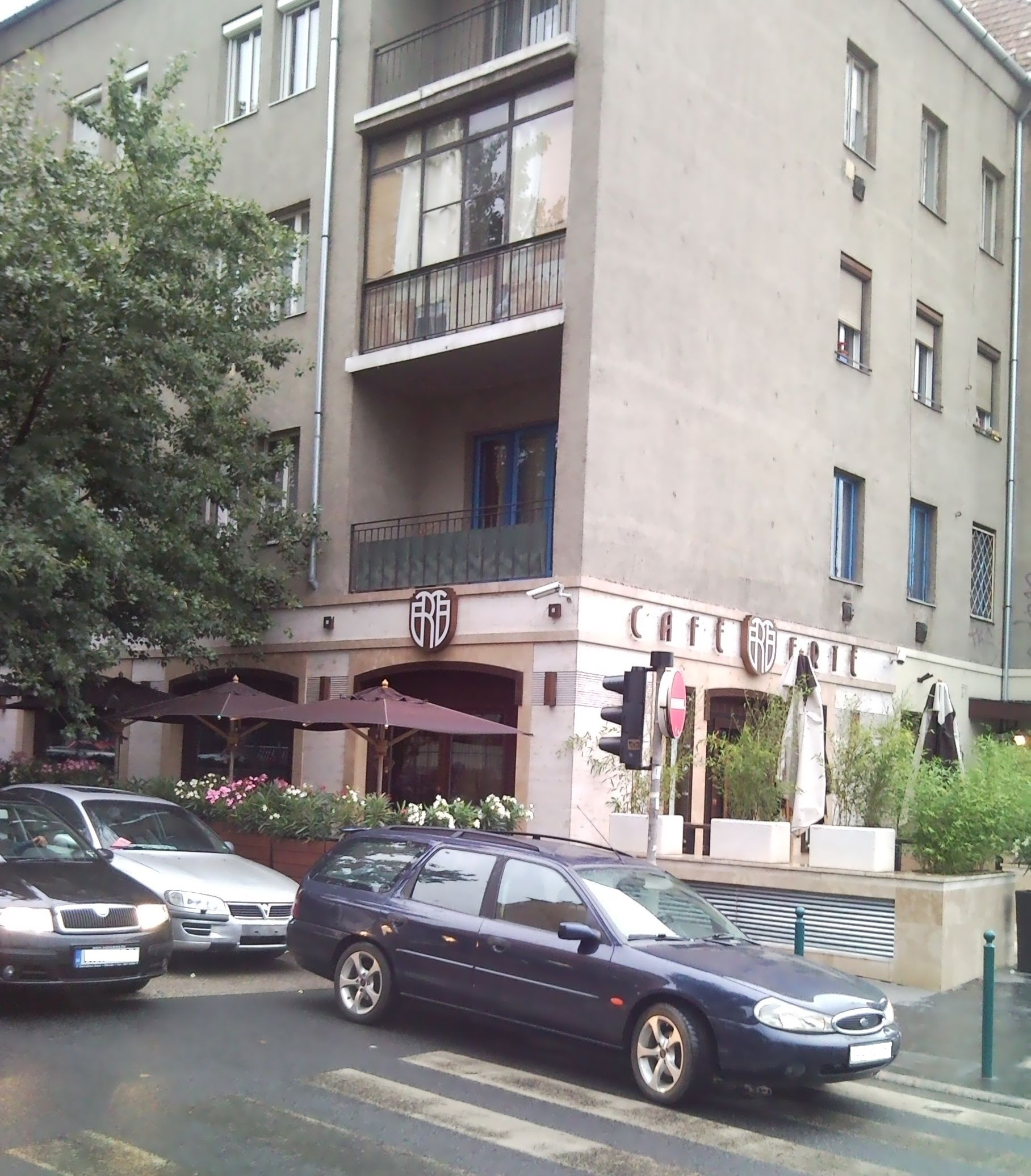 Az Alkotás presszó az Alkotás utca és a Tartsay Vilmos utca sarkán